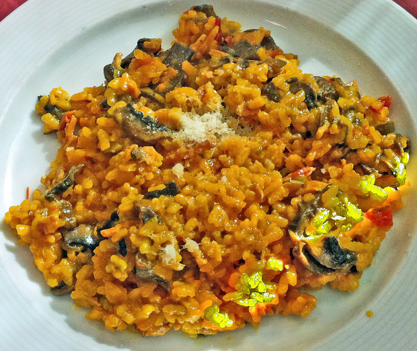 Risotto alla milanese